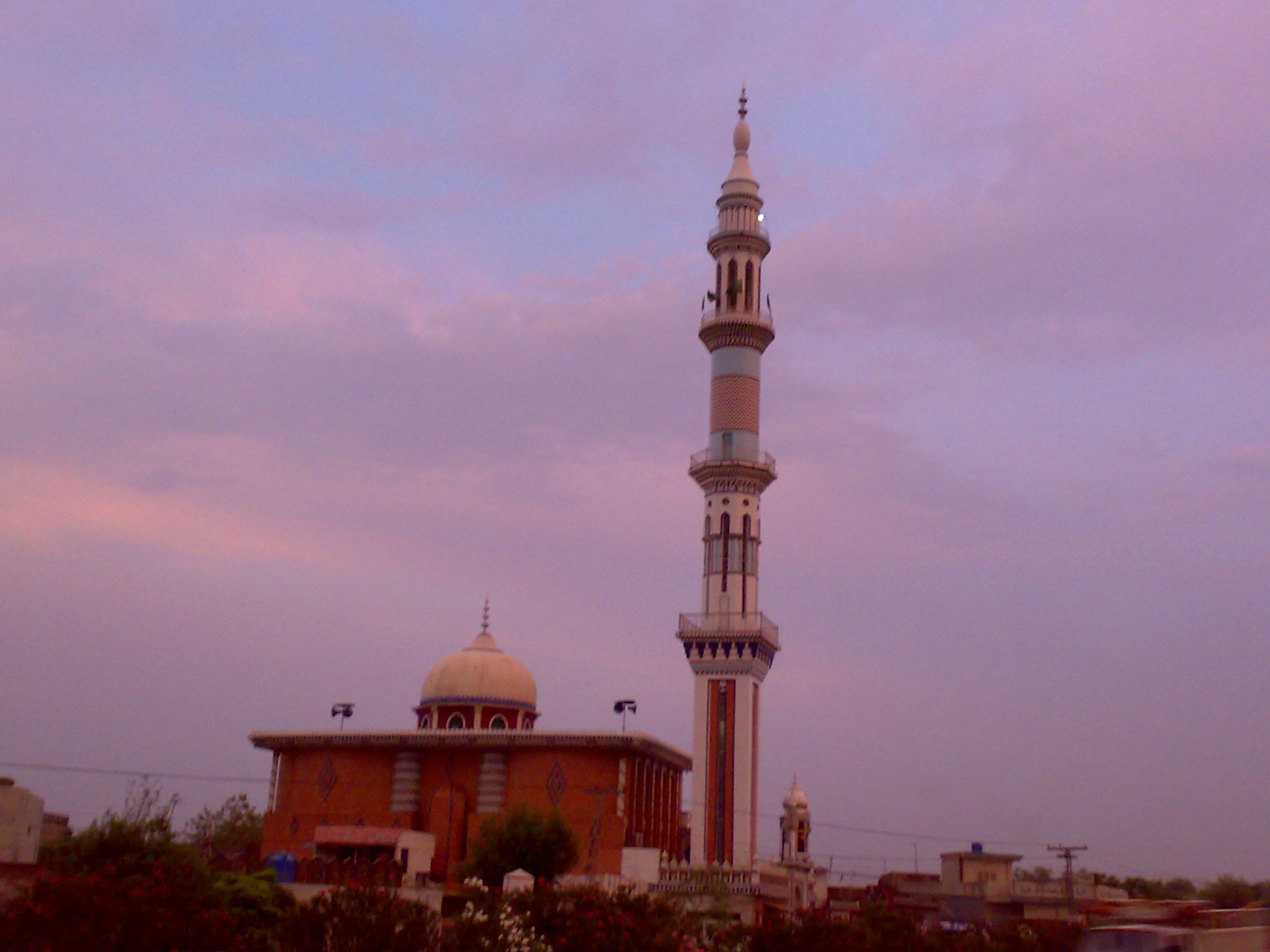 bura Jungle mosque — Jhelum - Pakistan.